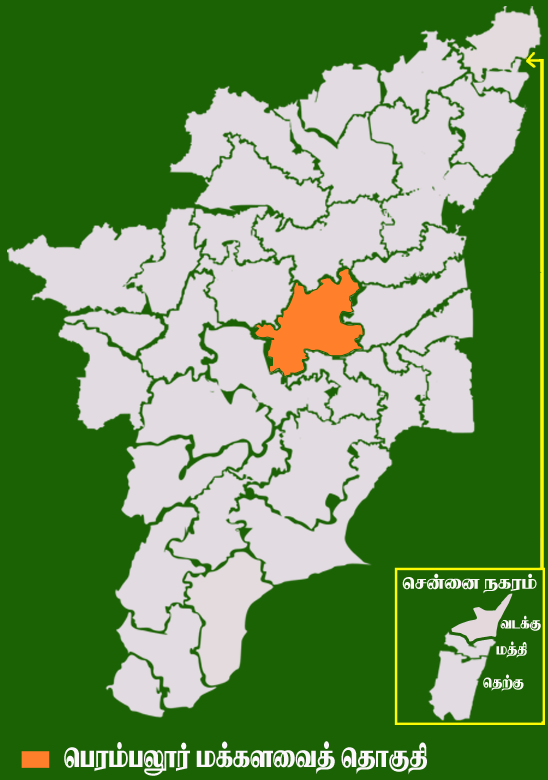 தமிழக வரைபடத்தில் உள்ள பெரம்பலூர் மக்களவைத் தொகுதி